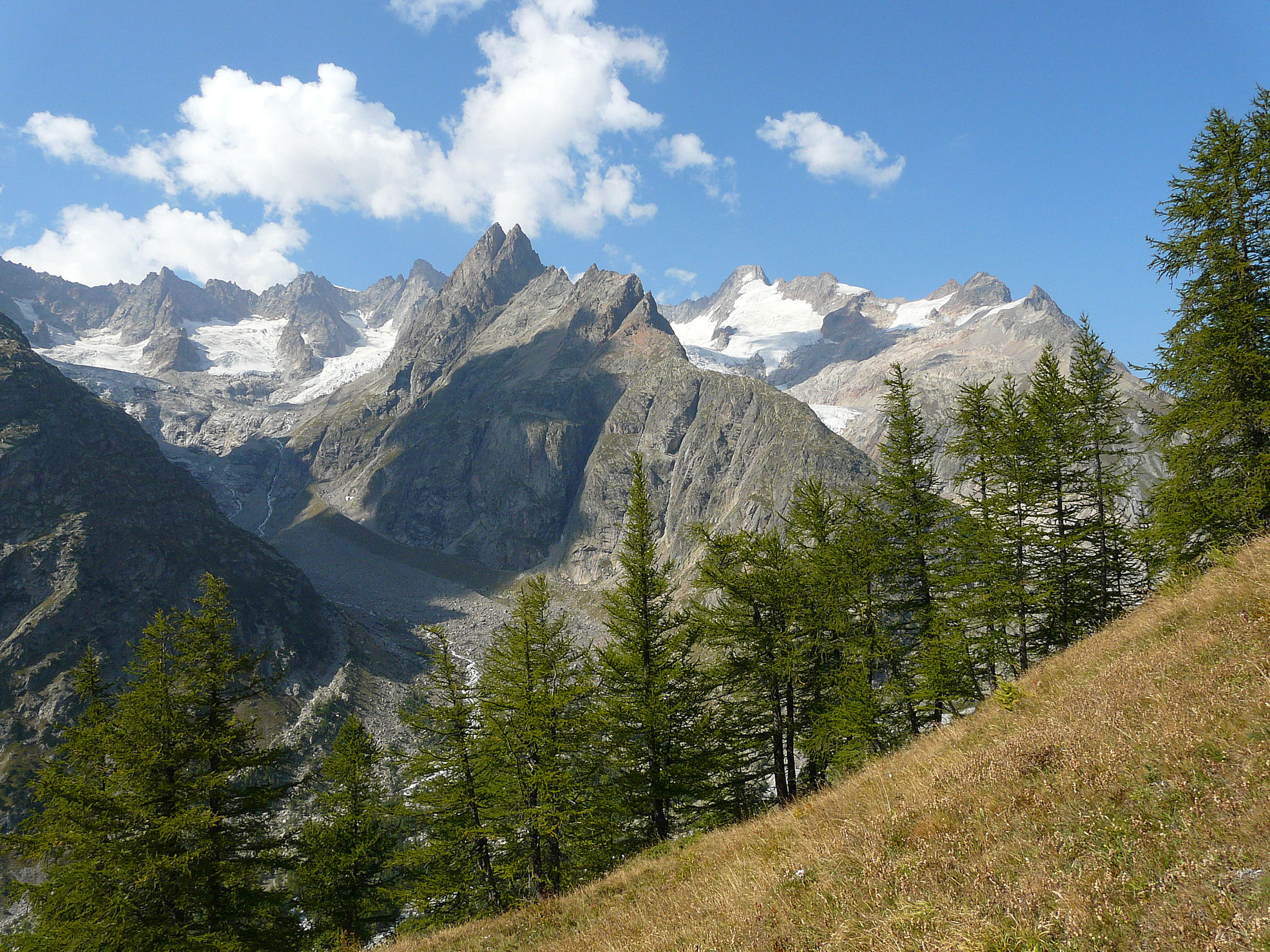 Le Aiguilles Rouges de Triolet - Massiccio del Monte Bianco - collocate tra il bacino del Triolet e quello del ghiacciaio di Pré de Bar